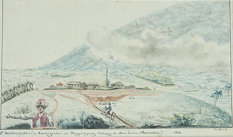 Fort van der Capellen in 1826